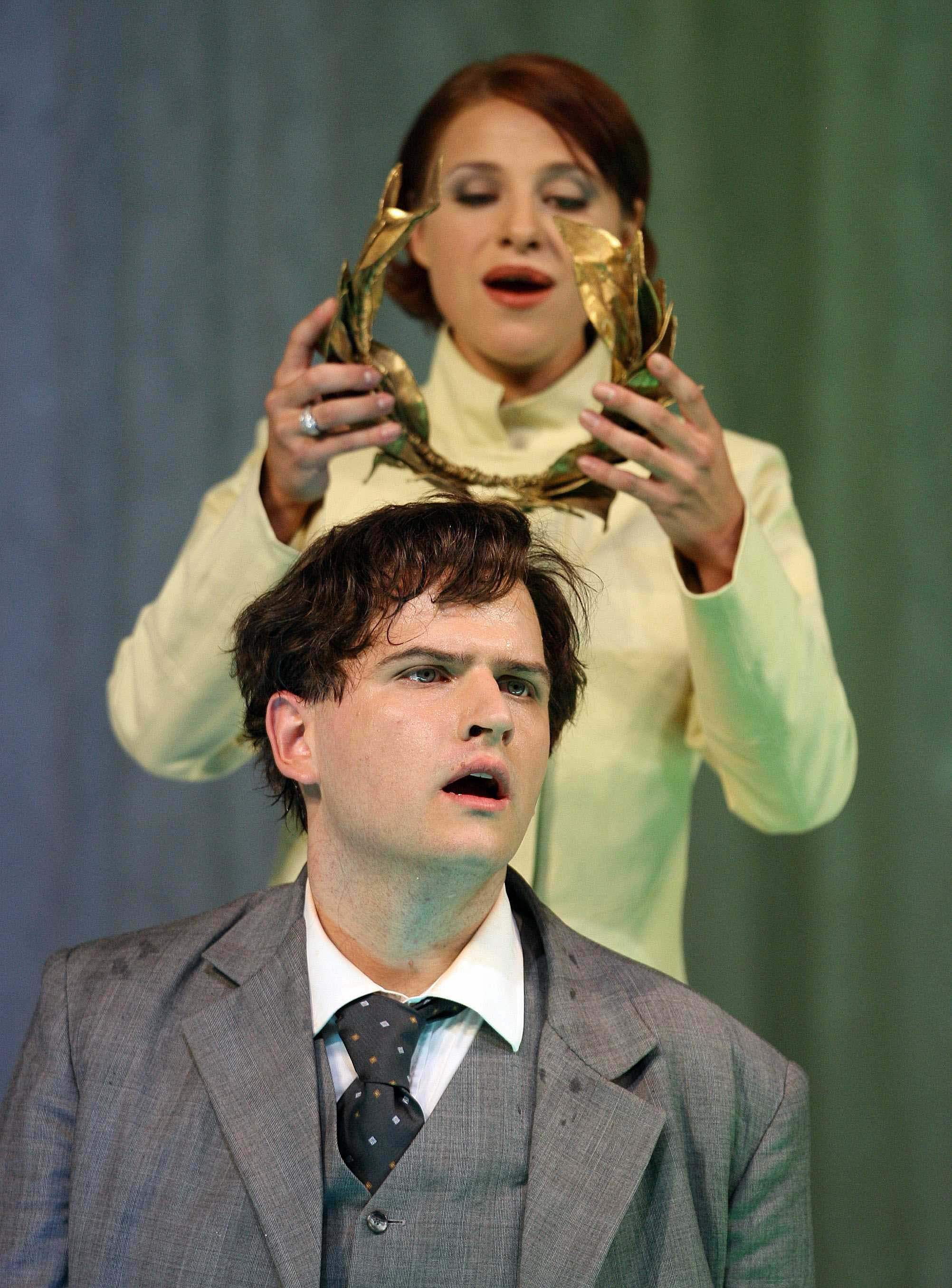 Blagoj Nacoski